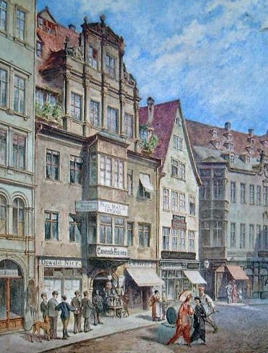 Deutrichs Hof an der Reichsstraße in Leipzig um 1900. Aquarell von Georg Dehn